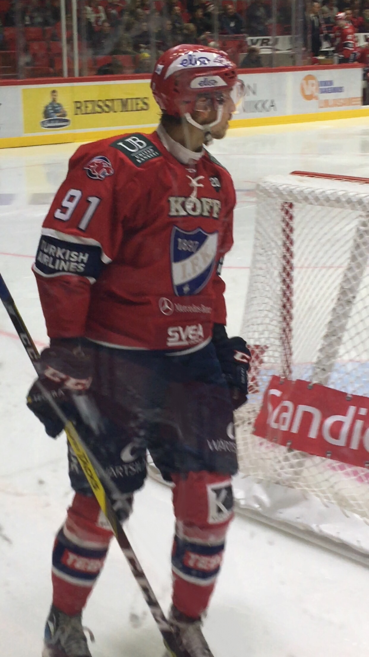 Jääkiekkoilija Corey Elkins edustamassa Helsingin IFK:ta 13. lokakuuta 2016 ottelussa HIFK–SaiPa.